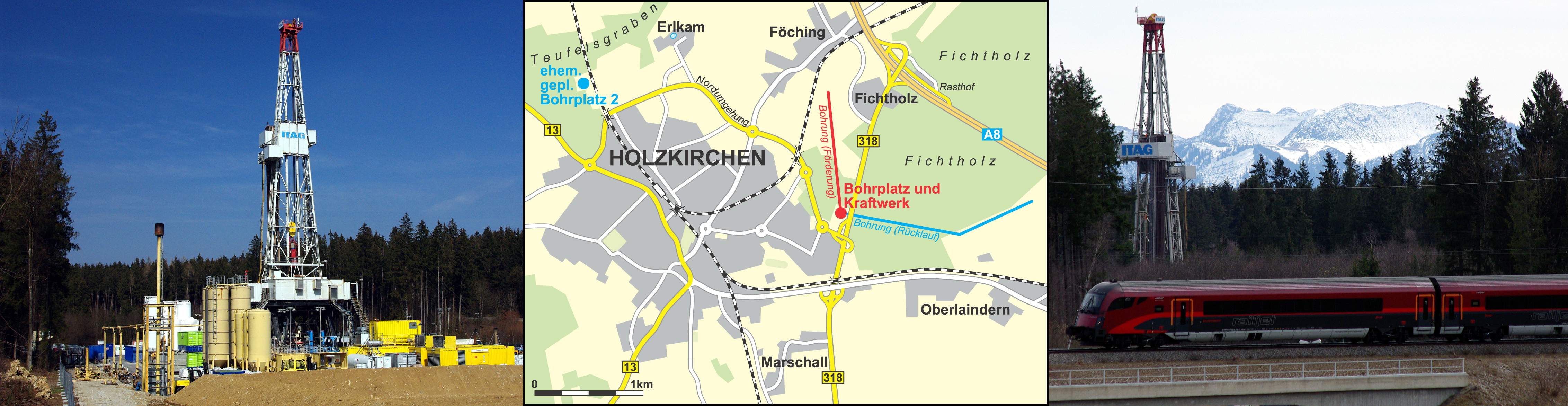 Geothermal energy in Holzkirchen